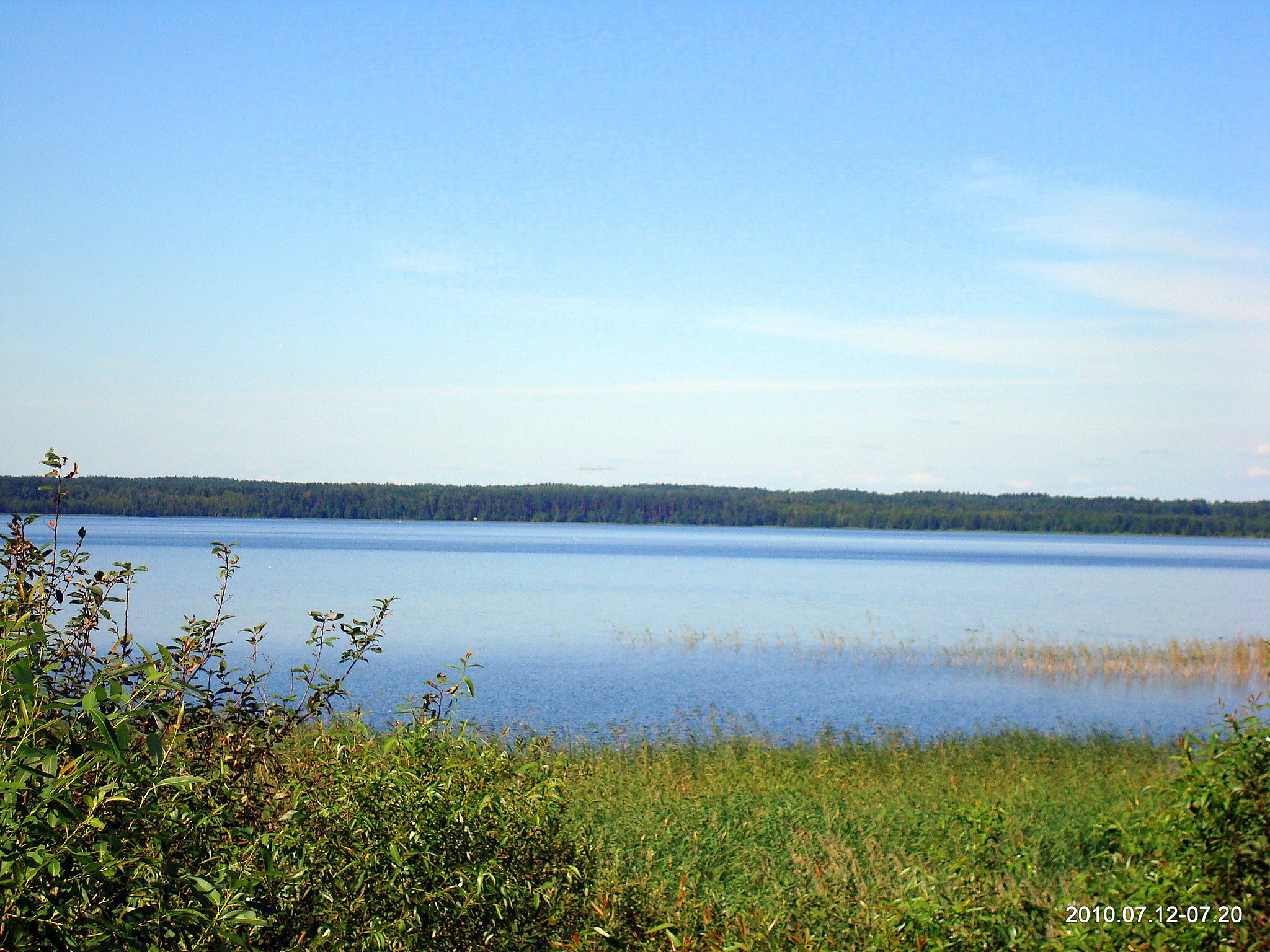 Озеро Обстерно